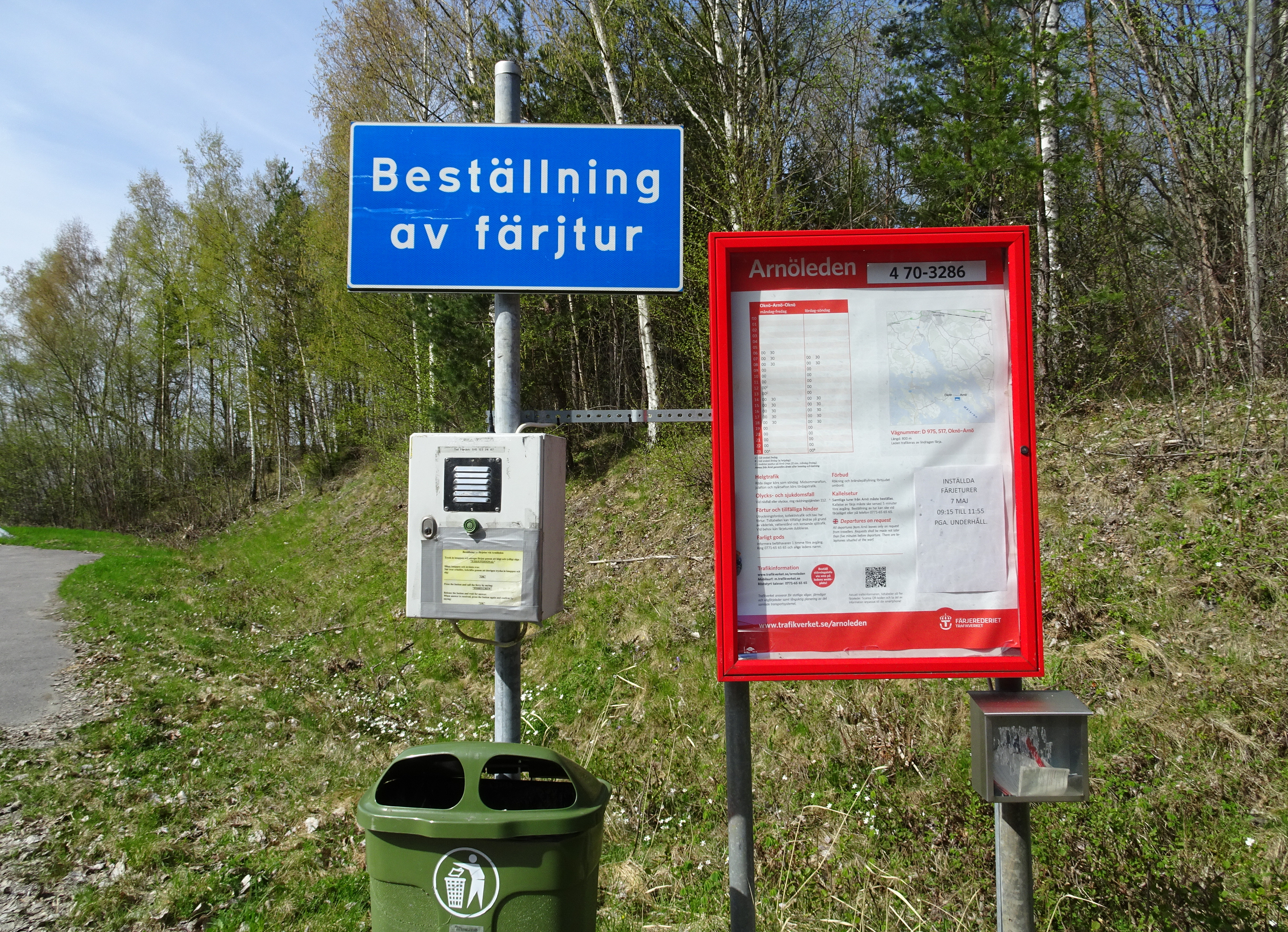 Linfärjan, Arnöleden, maj 2018